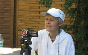 Regie